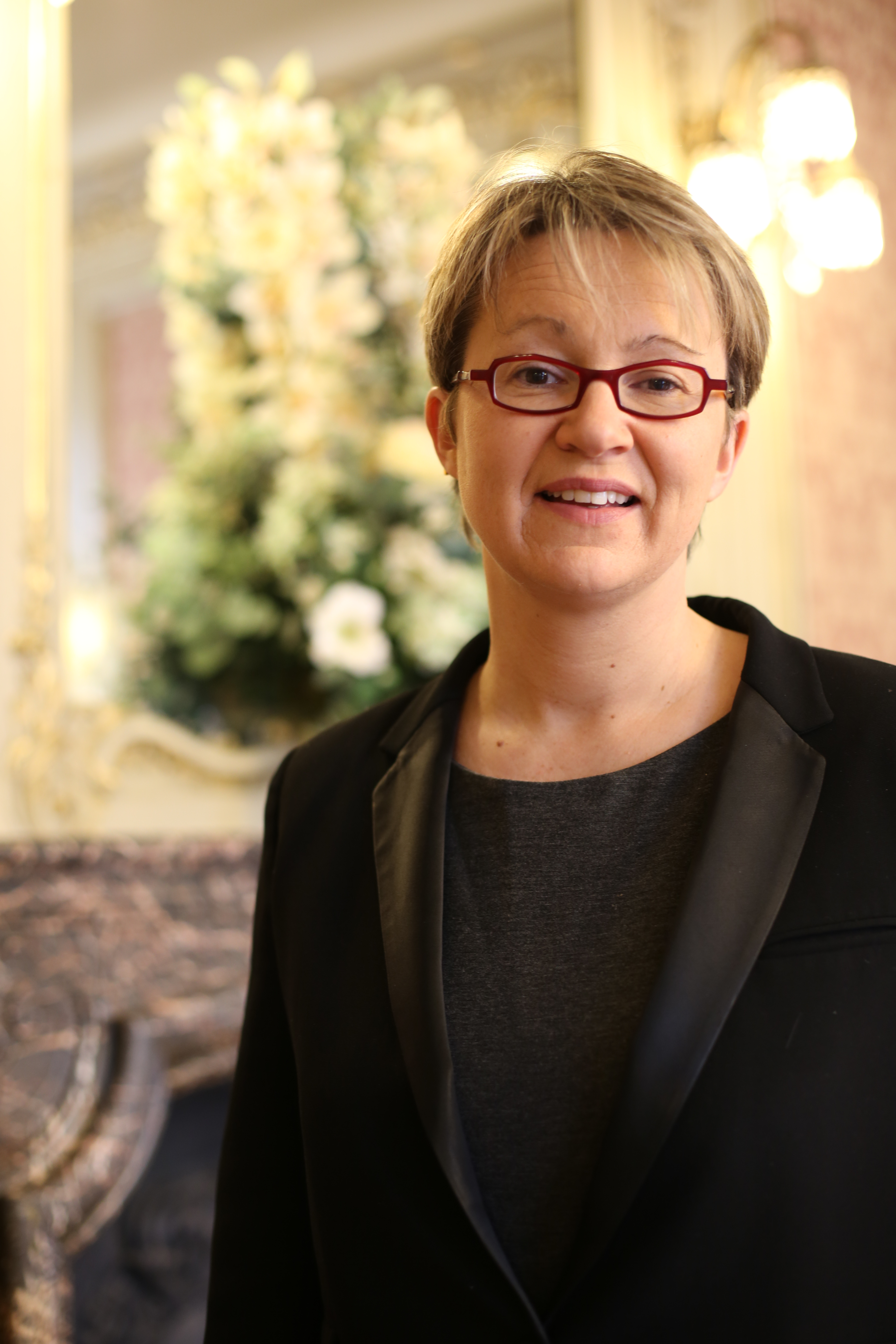 Nathalie Appéré, alors députée de la 2e circonscription d'Ille-et-Vilaine, et candidate PS à la mairie de Rennes